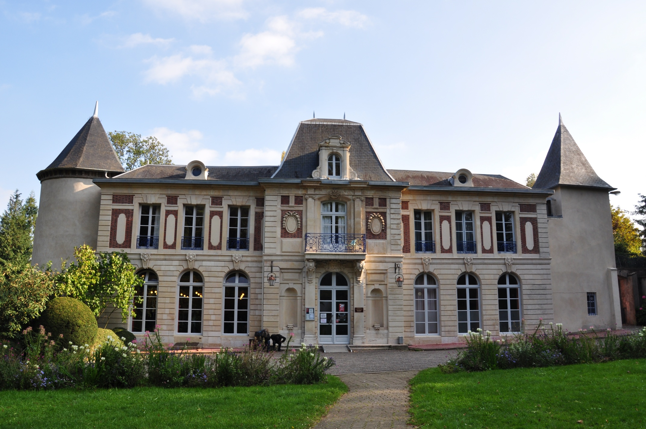 Château de Remicourt, à Villers-lès-Nancy en Meurthe-et-Moselle.